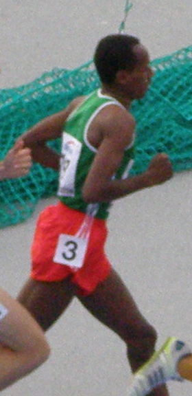 Mistrzostwa Świata Juniorów w Lekkoatletyce Bydgoszcz 2008 - finał 1500m M